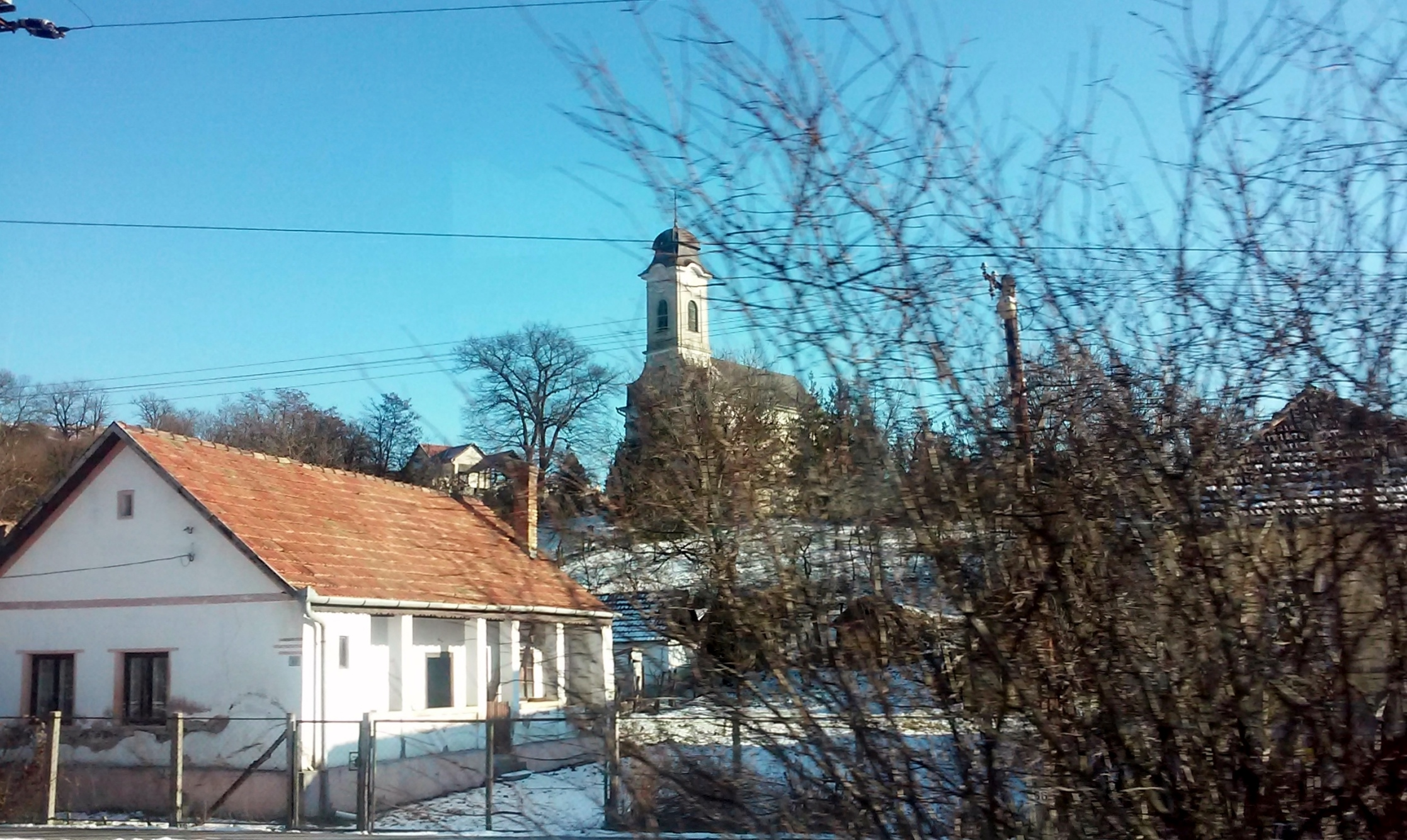 Szent István-templom, Fedémes This is a photo of a monument in Hungary. Identifier: 5651